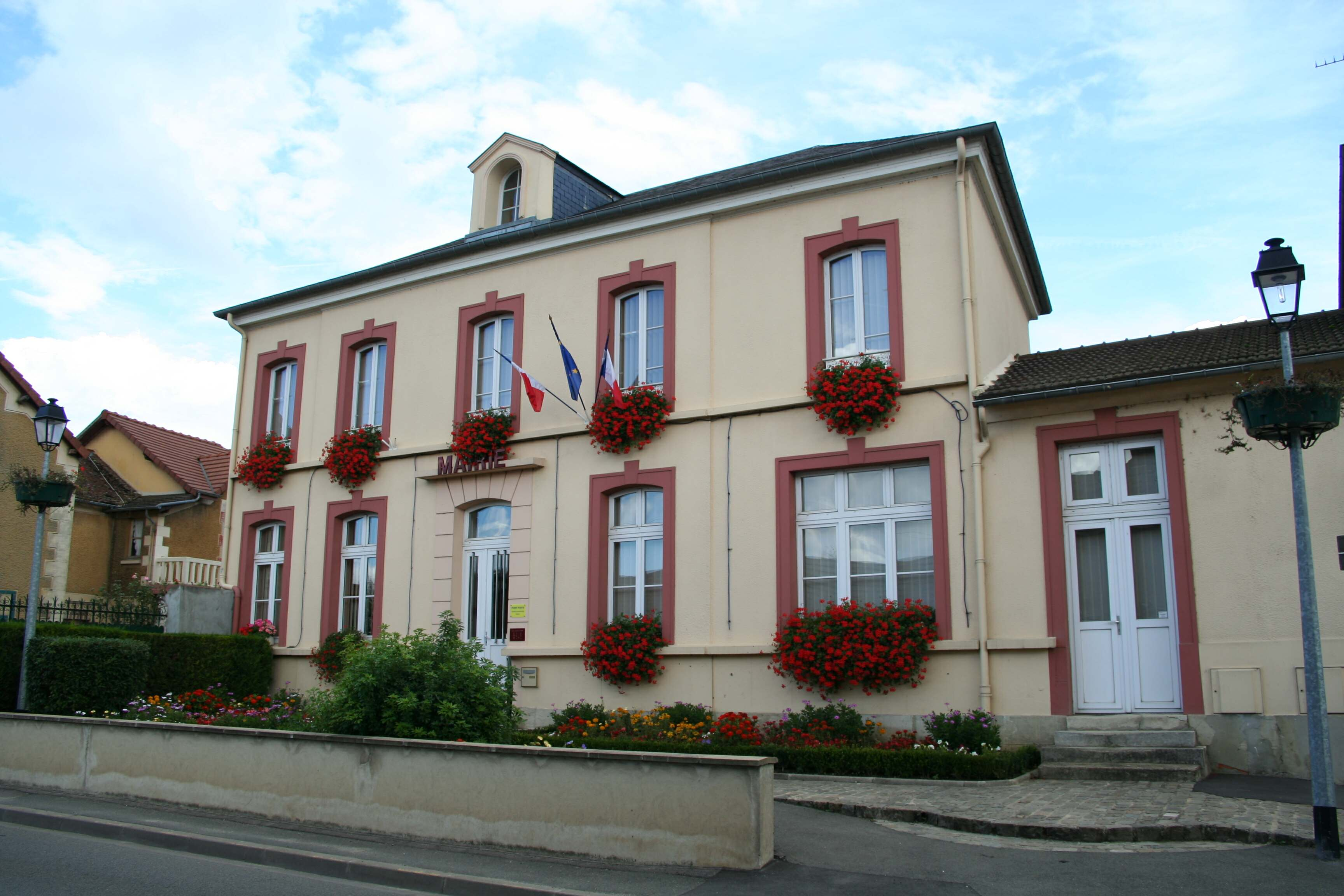 Mairie de Nézel - Yvelines (France)